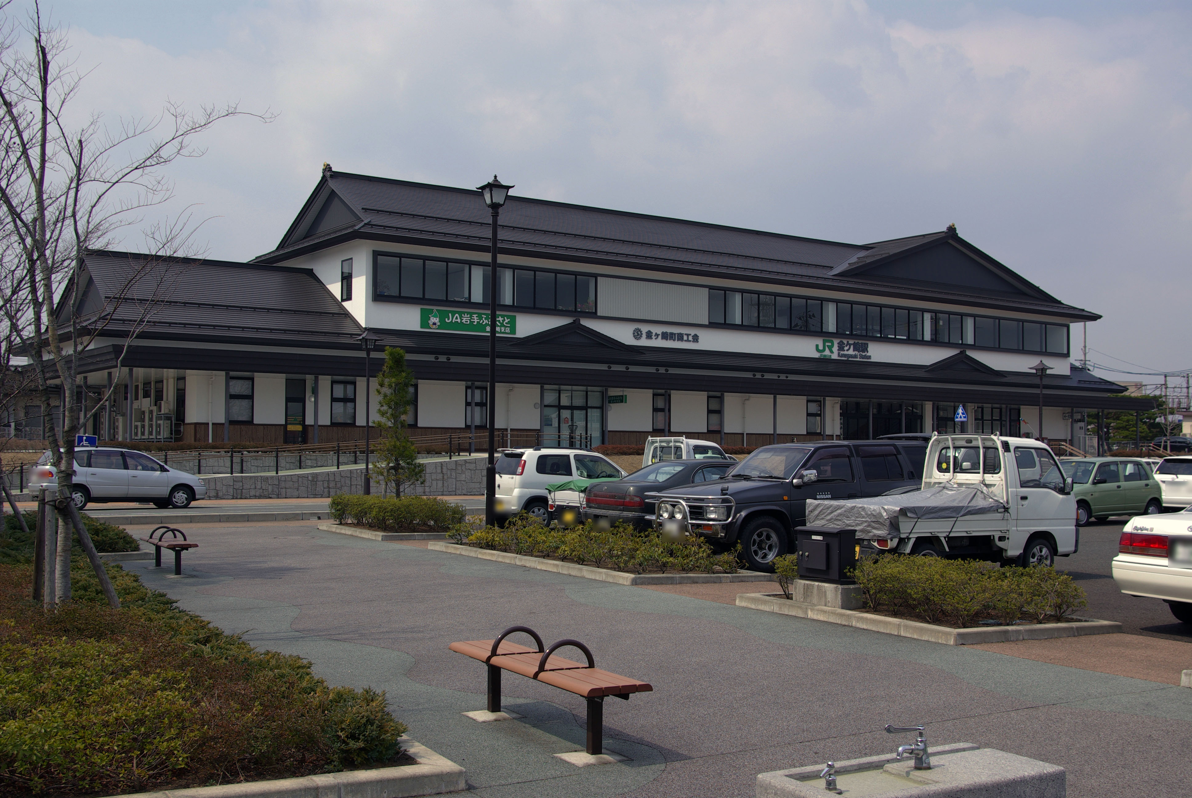 JR東北本線金ヶ崎駅